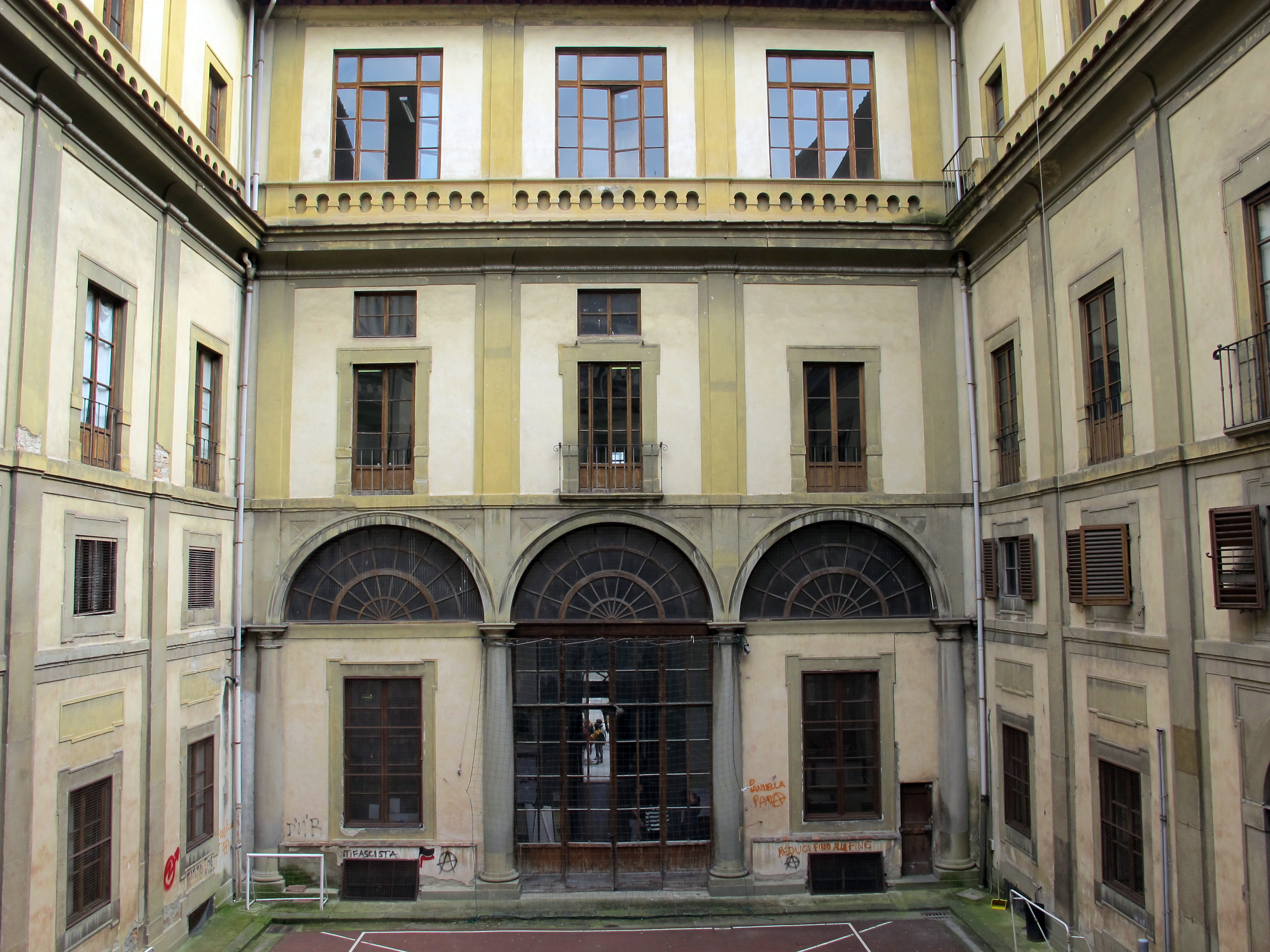 Palazzo Martelli (Scolopi), Firenze